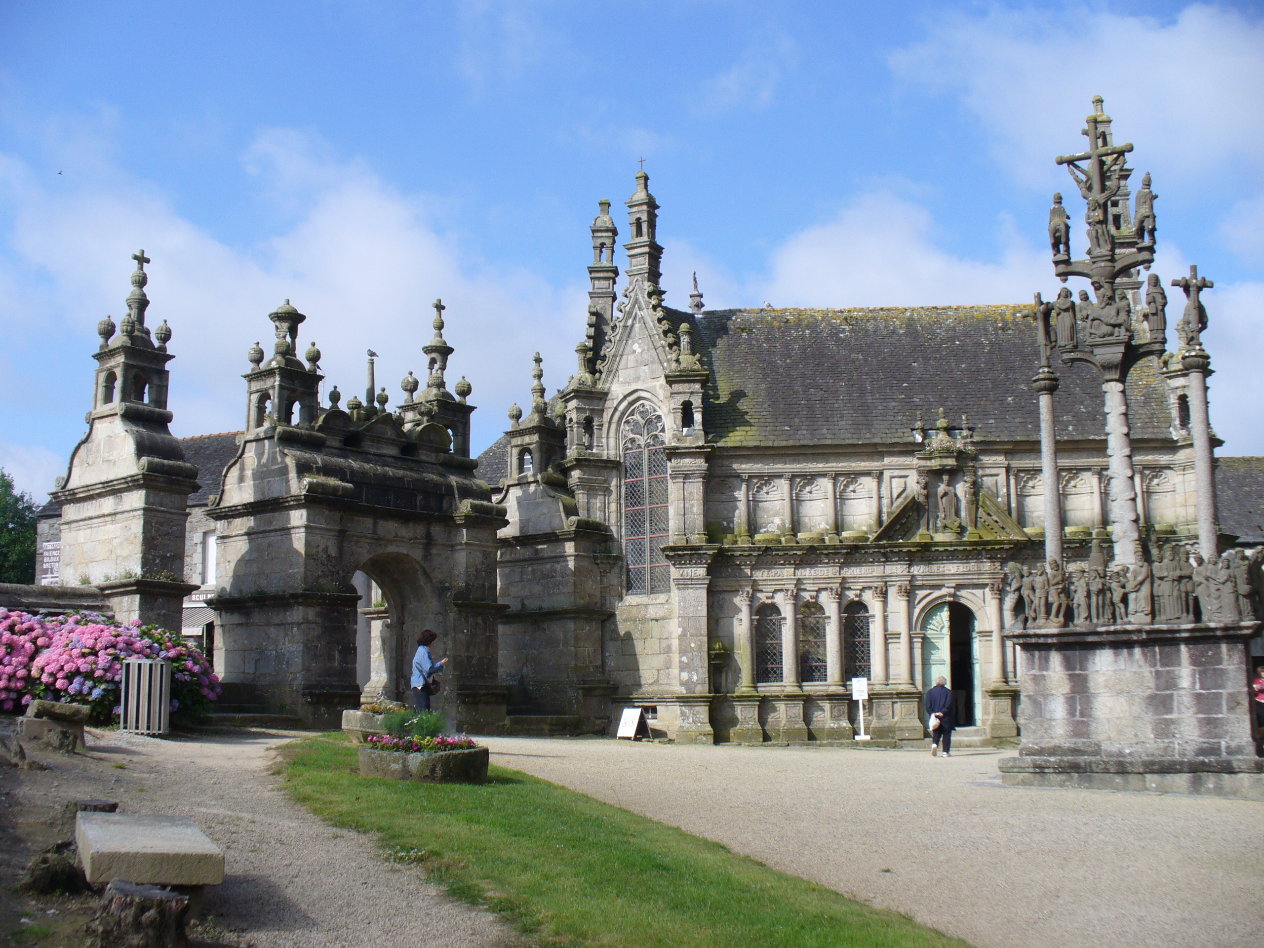 St.Thegonnec-Umfriedeter Pfarrbezirk-Triumphpforte & zweistöckiges Beinhaus(1676-1682) & Kavalerienberg-Kirche Notre Dame St.Thegonnec(16.-18.Jh.)EH